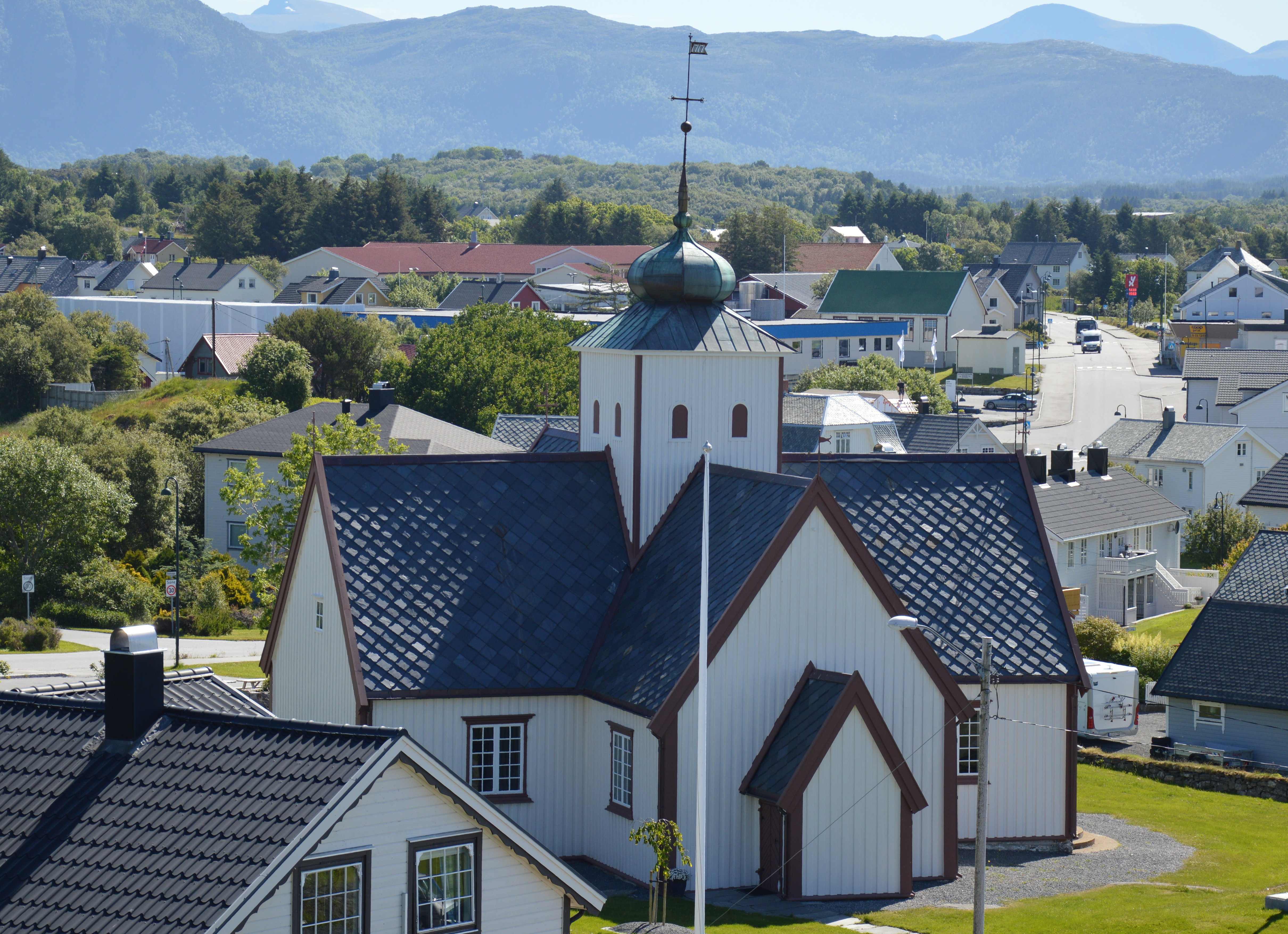 Kirche von Bud